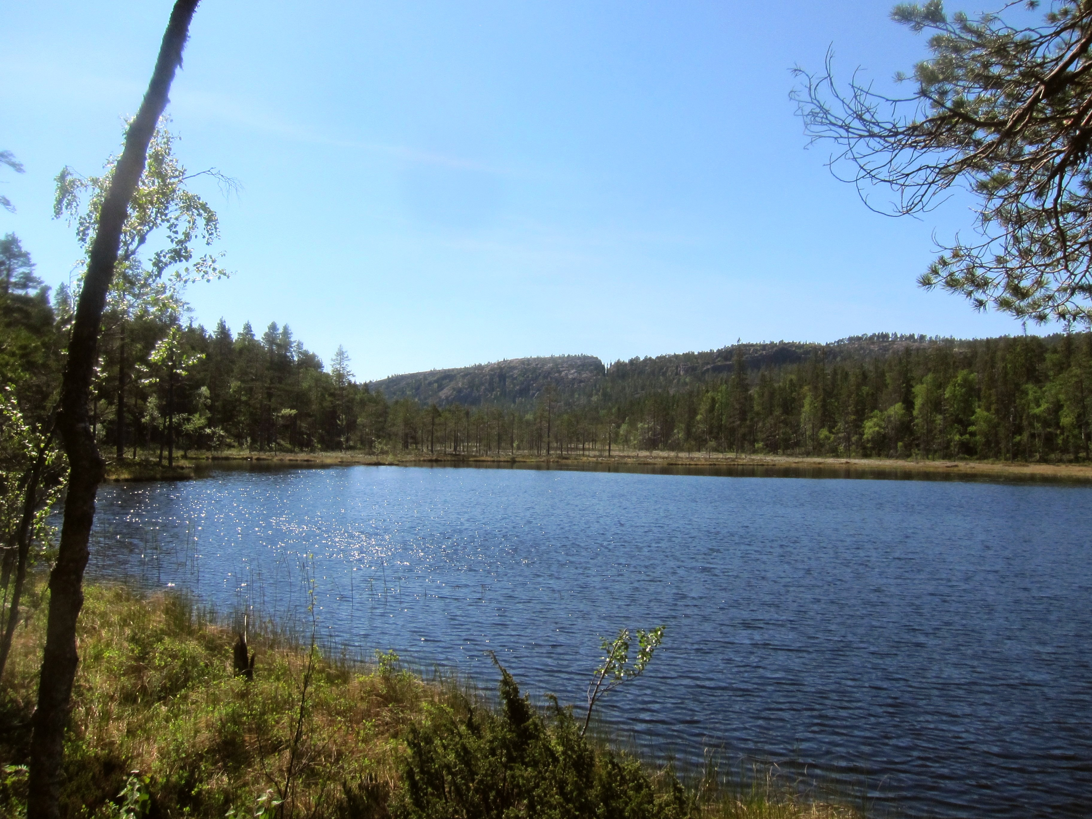 Den ena av Tärnättvattnen.